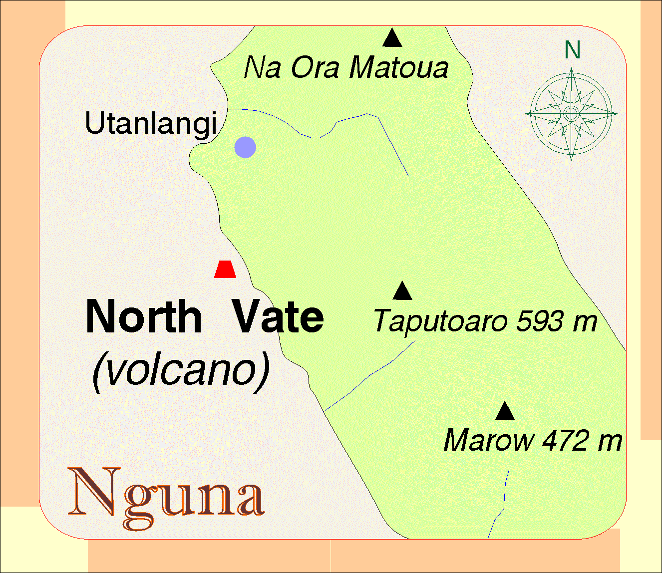 Карта на вулкана Норт Вейт.